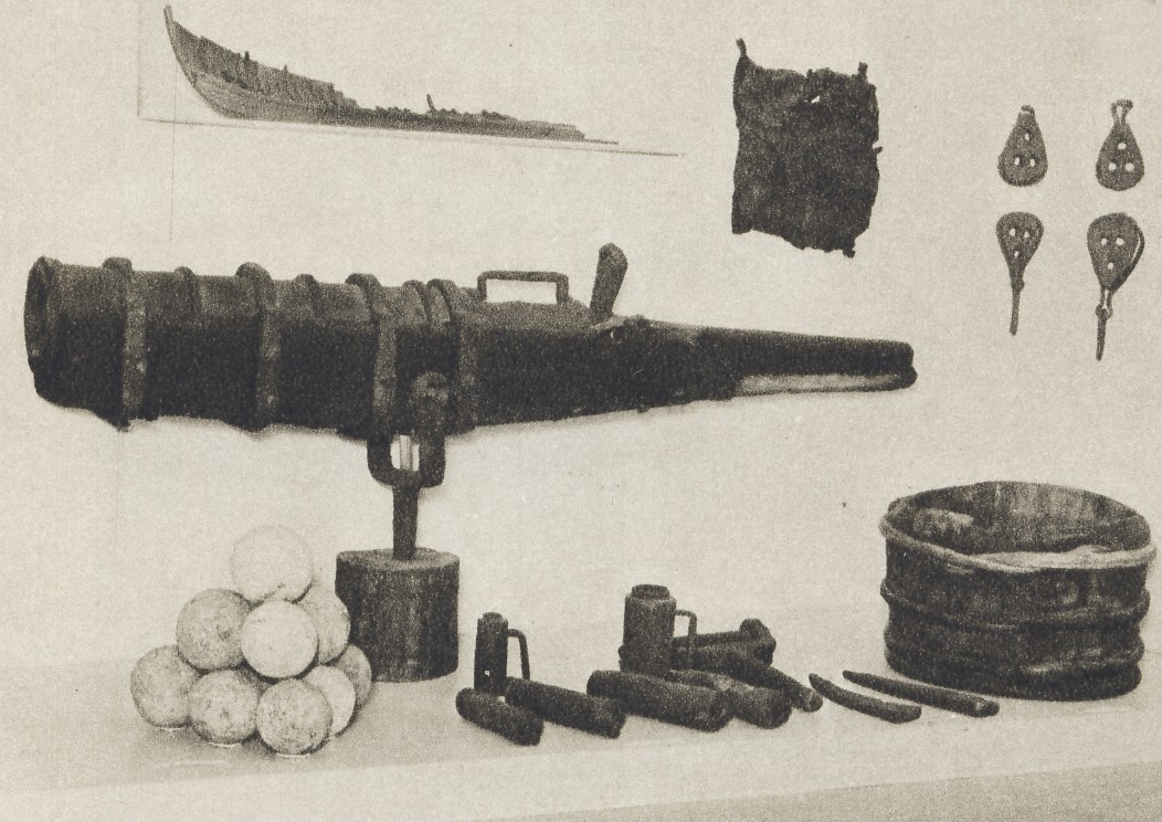 Kanon och andra föremål från Riddarholmsskeppet